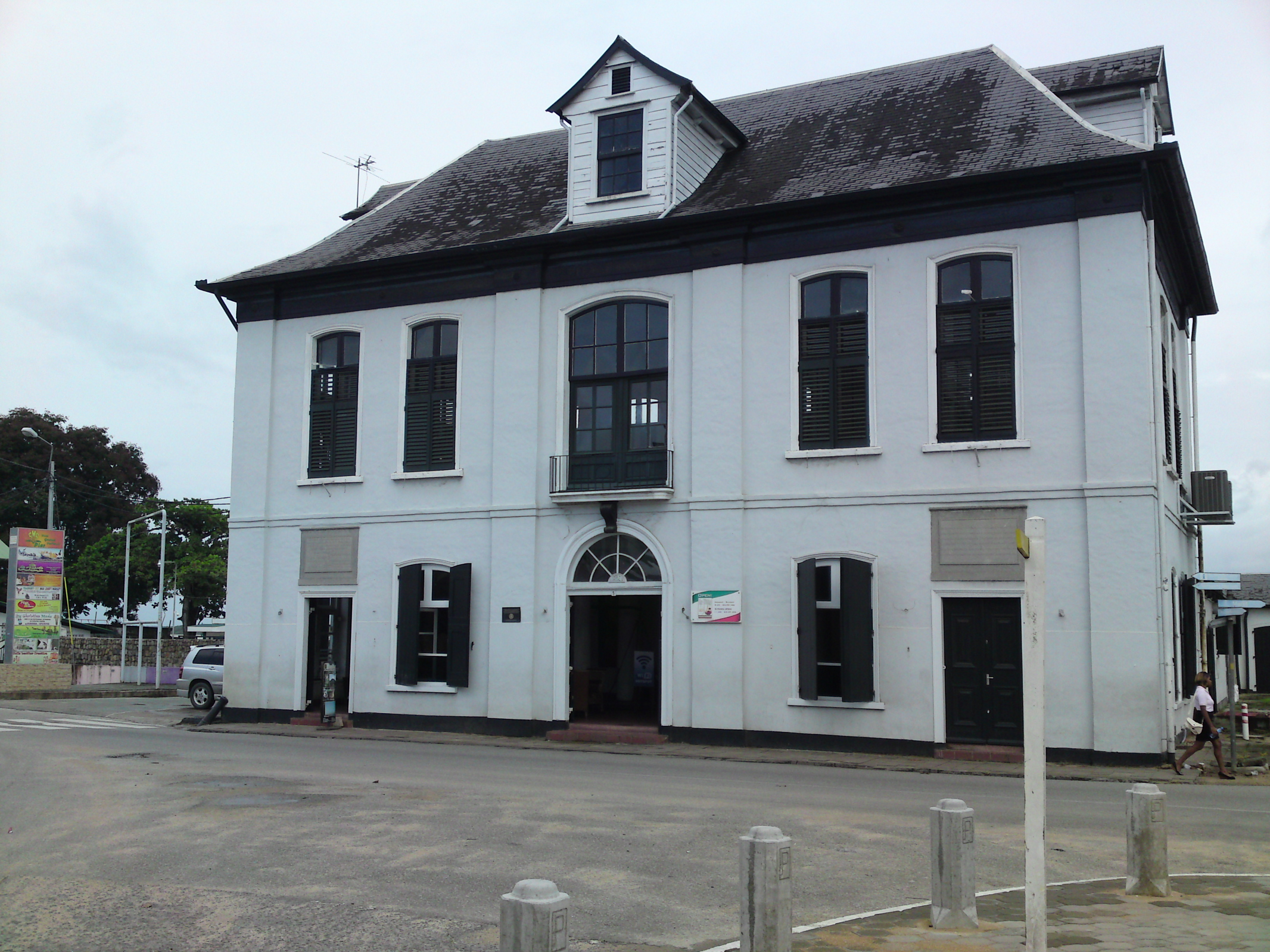 De Waag